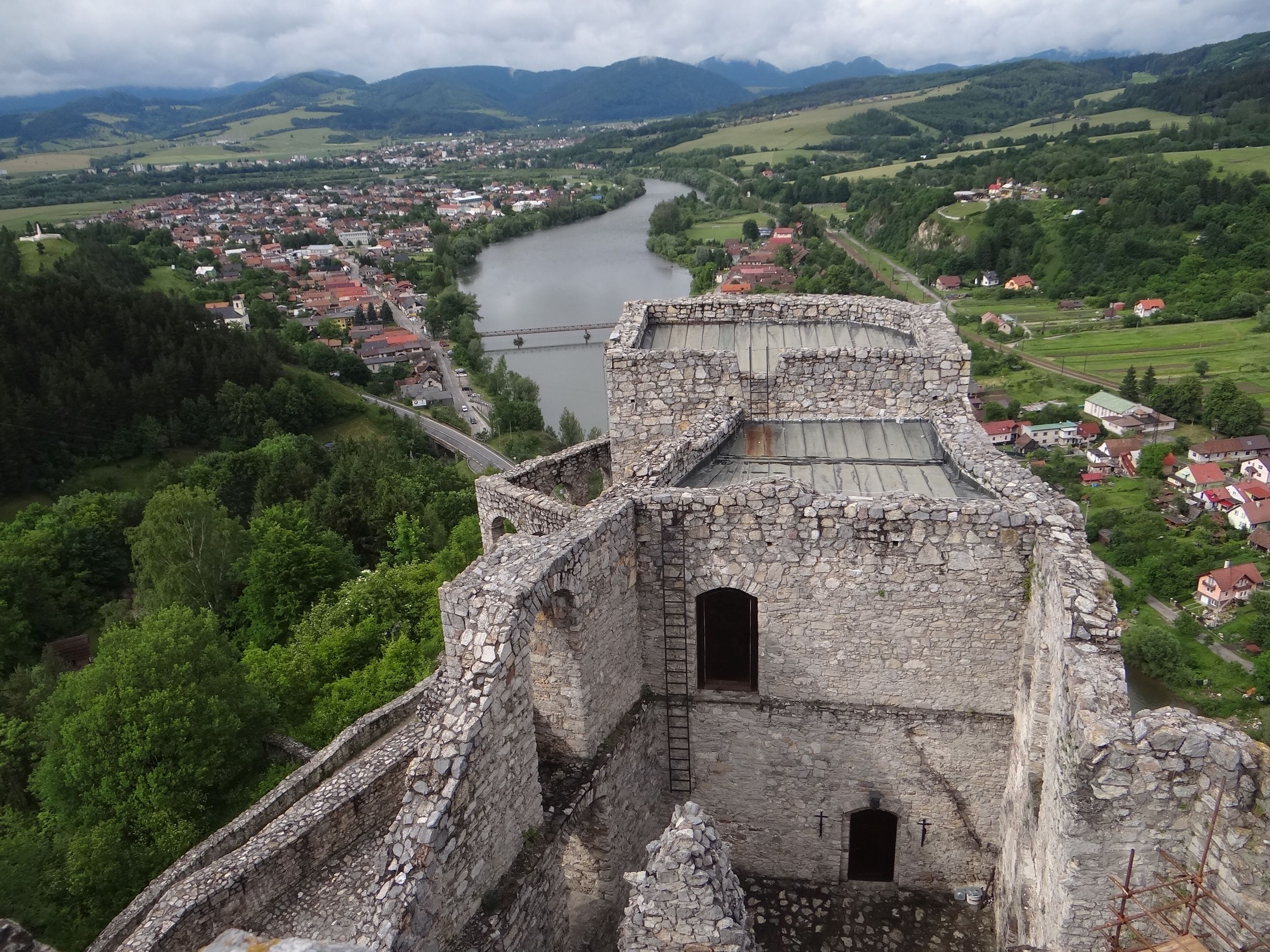 Hrad Strečno